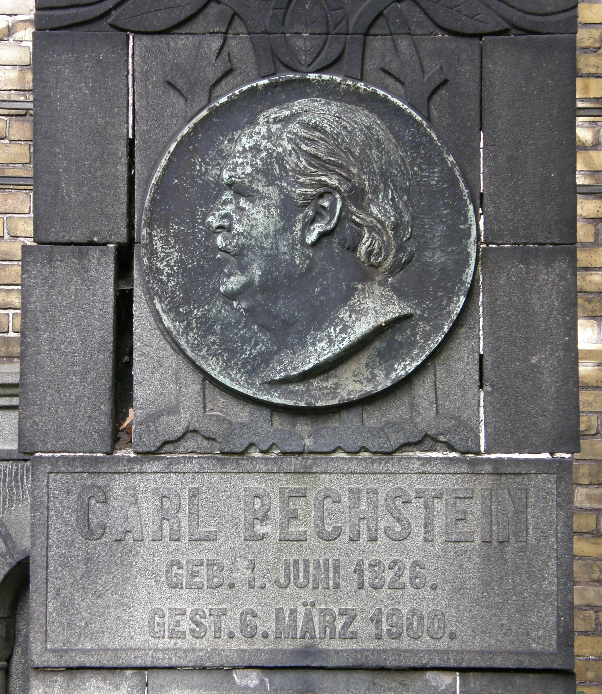 Relieftondo und Inschrift von Carl Bechstein an dessen Grab auf dem Sophien-Friedhof II in Berlin-Mitte.